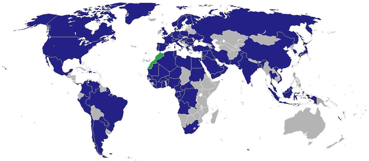 خريطة تبين البعثات الدبلوماسية المغربية في العالم